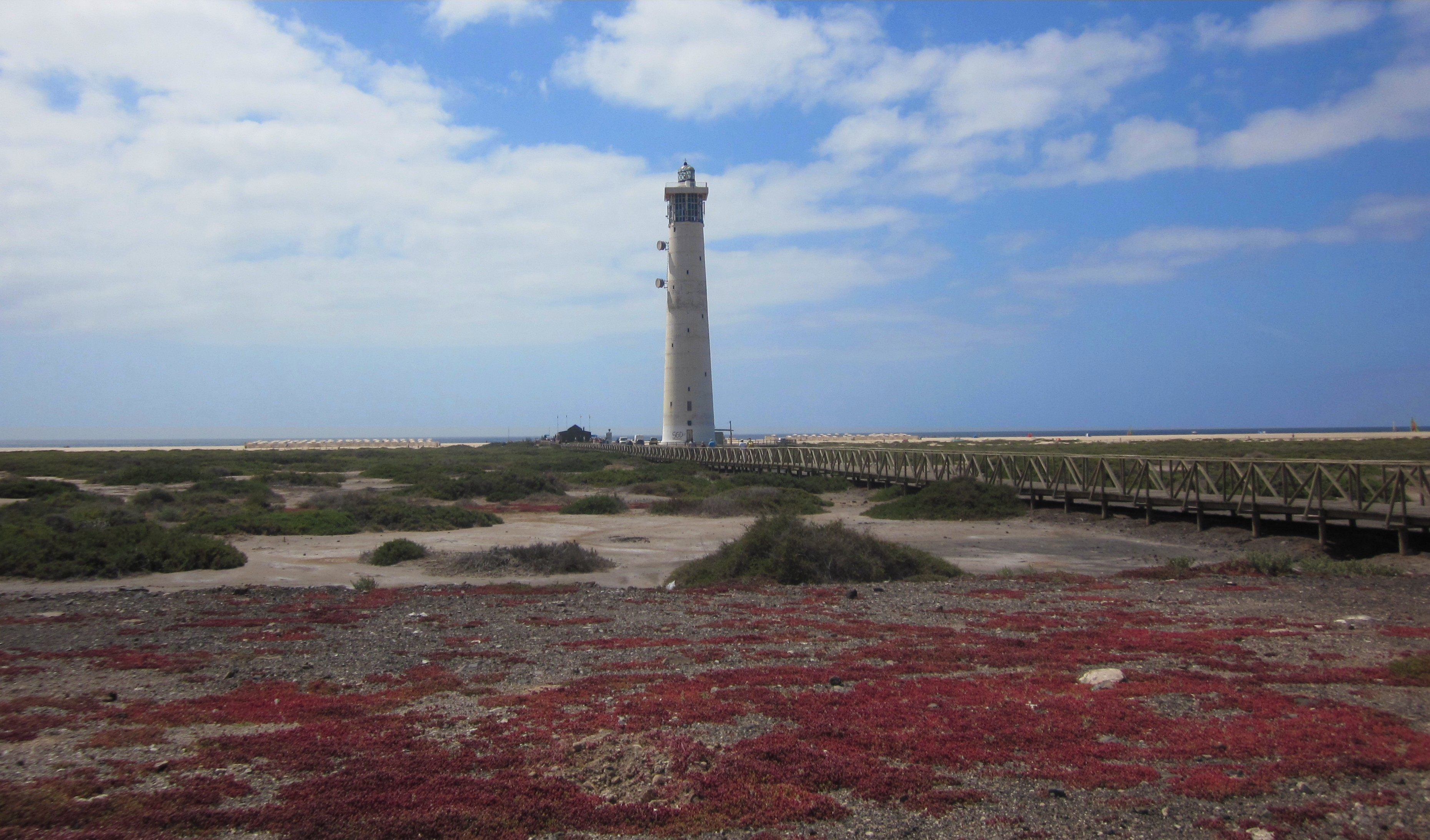 Phare de Jandia